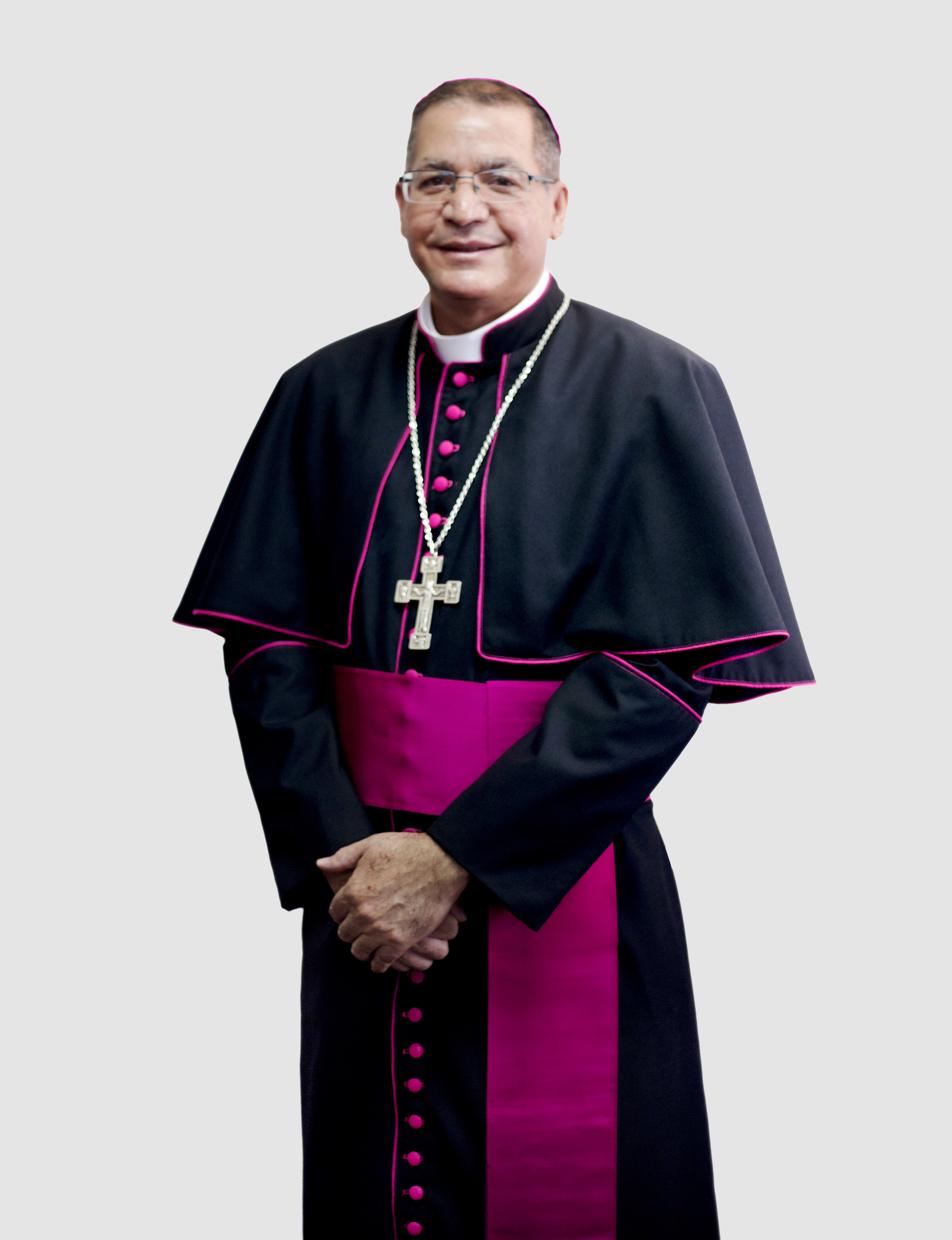 Imagen oficial de Mons. Amable Durán